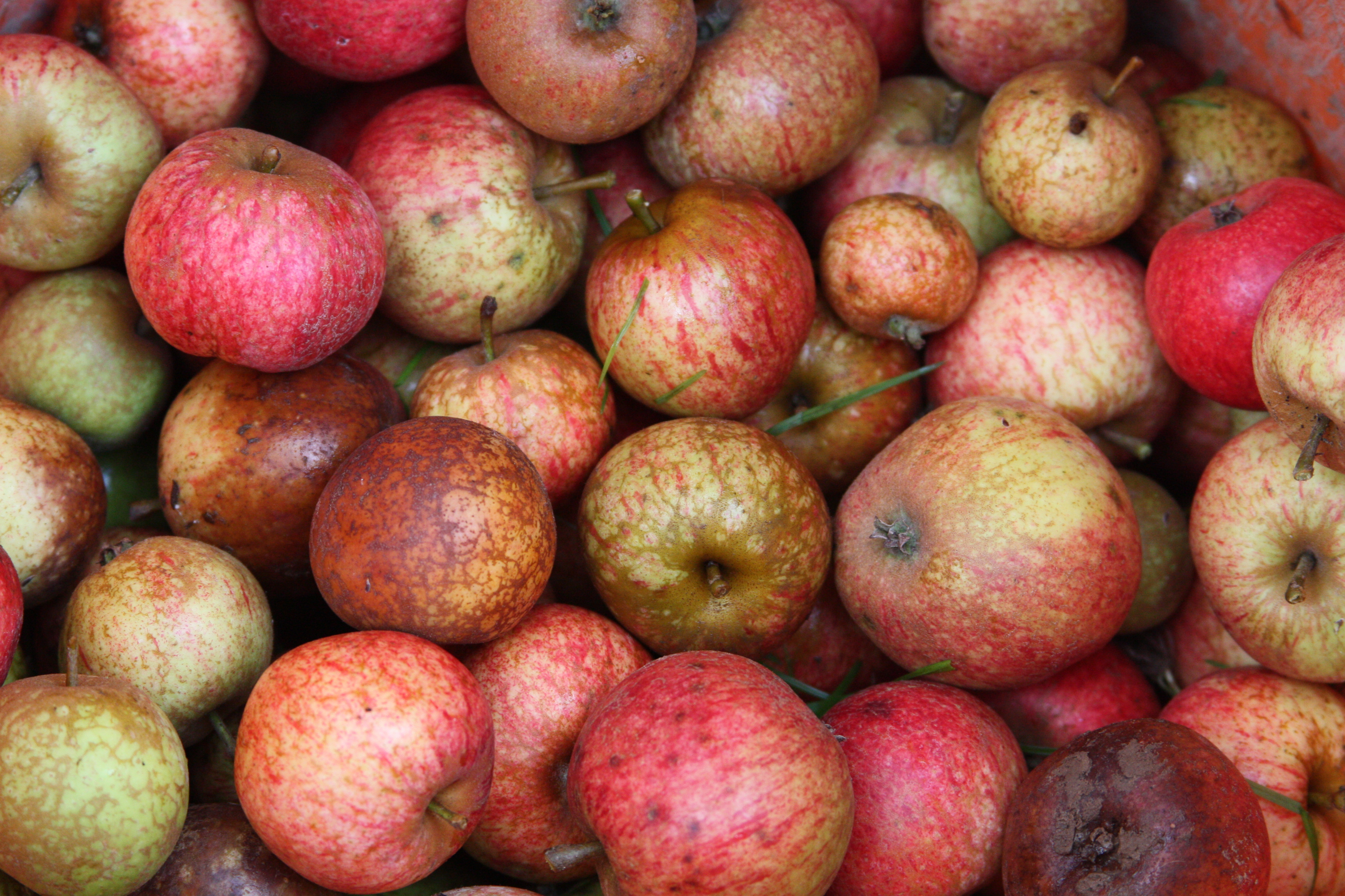 Pommes rouges à cidre de Normandie